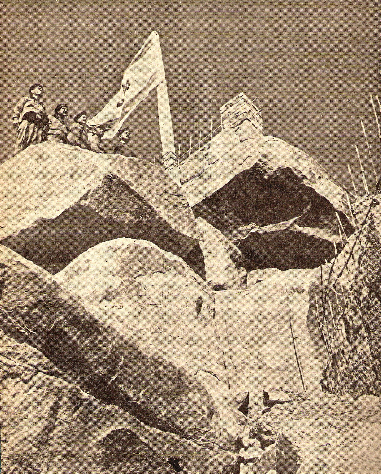 "he:דגל ישראל על he:הר סיני", בשער he:דבר לילדים.